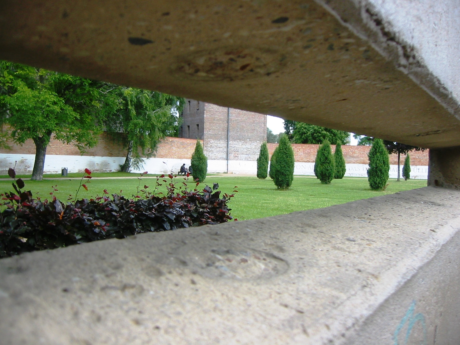 Blick von der Einzelzelle auf ein Beamtenhaus im Geschichtspark Ehemaliges Zellengefängnis Moabit auf dem Gelände des ehemaligen Zellengefängnis Lehrter Straße in Berlin-Moabit (Mitte)